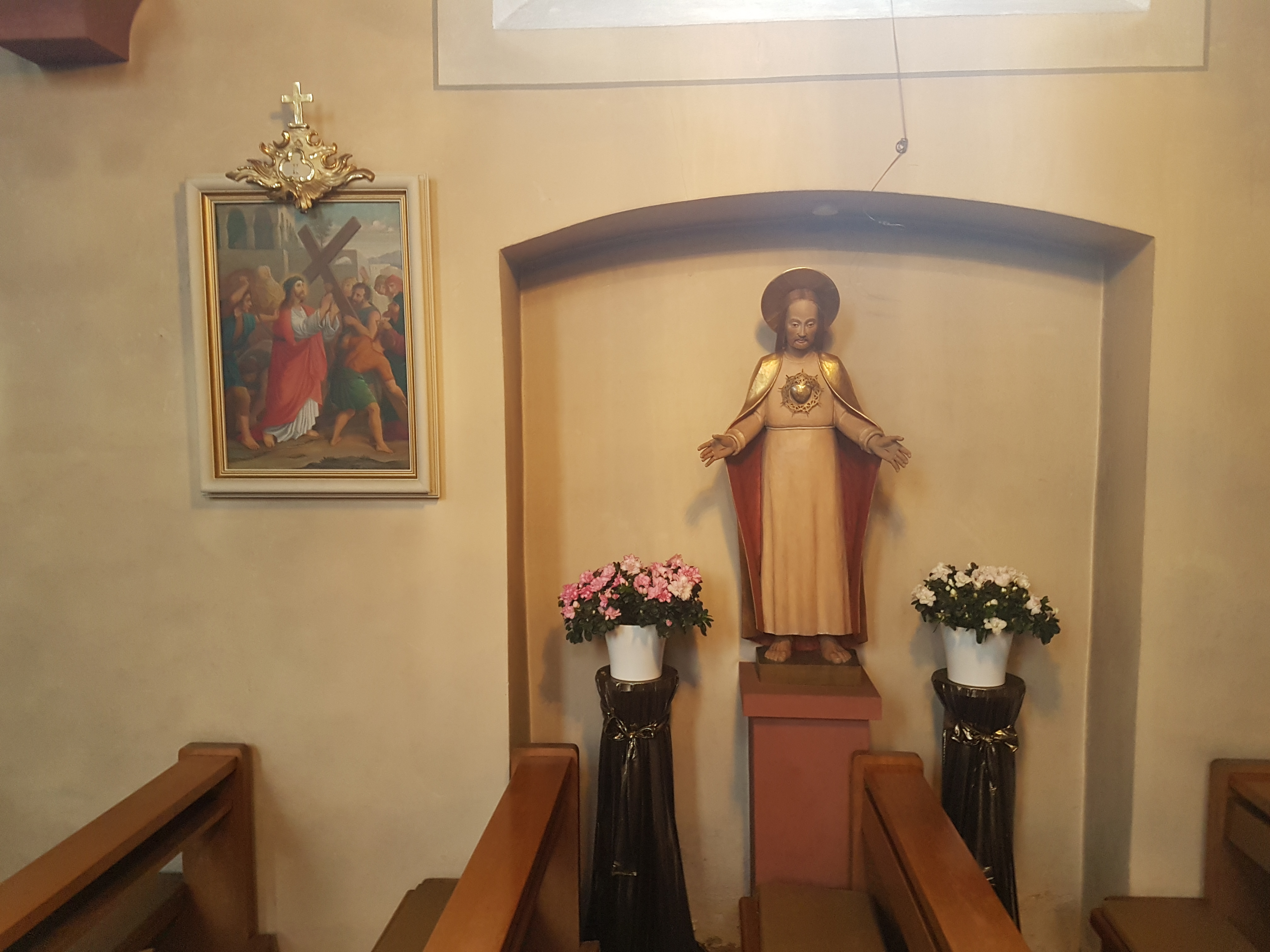 St. Georg Oberbalbach Innenansicht